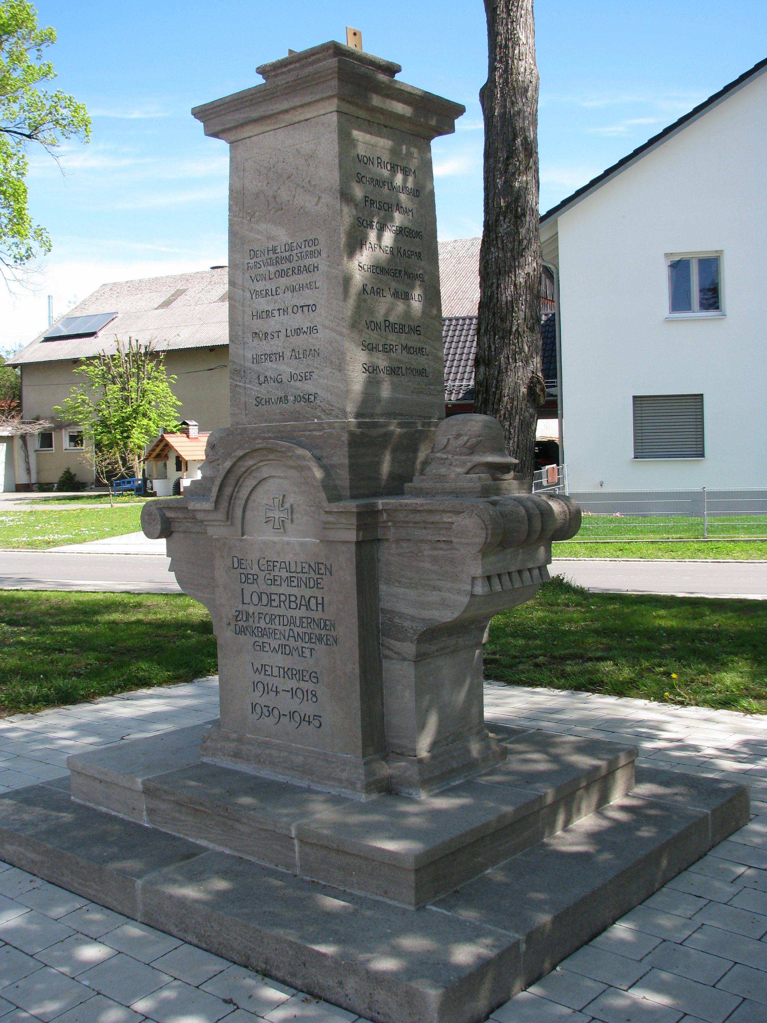 Loderbach, Ortsteil der Gemeinde Berg bei Neumarkt in der Oberpfalz, Gefallenendenkmal